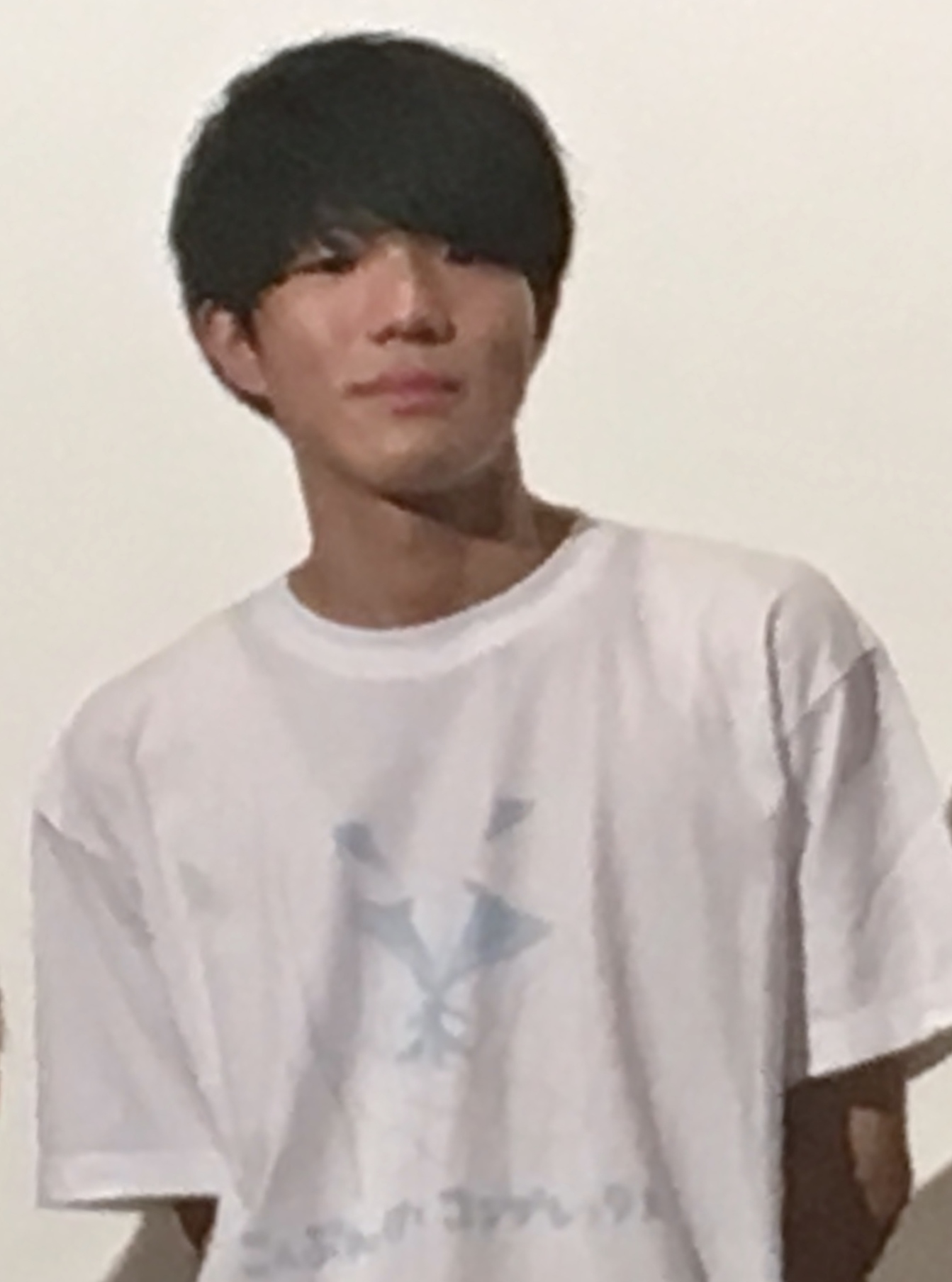 上妻成吾（2018年9月8日、新宿K's cinema） こんぷれっくす×コンプレックス舞台挨拶にて